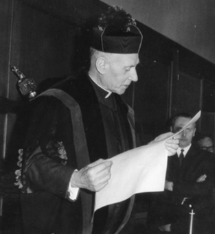 Albert Dondeyne durant un speech.